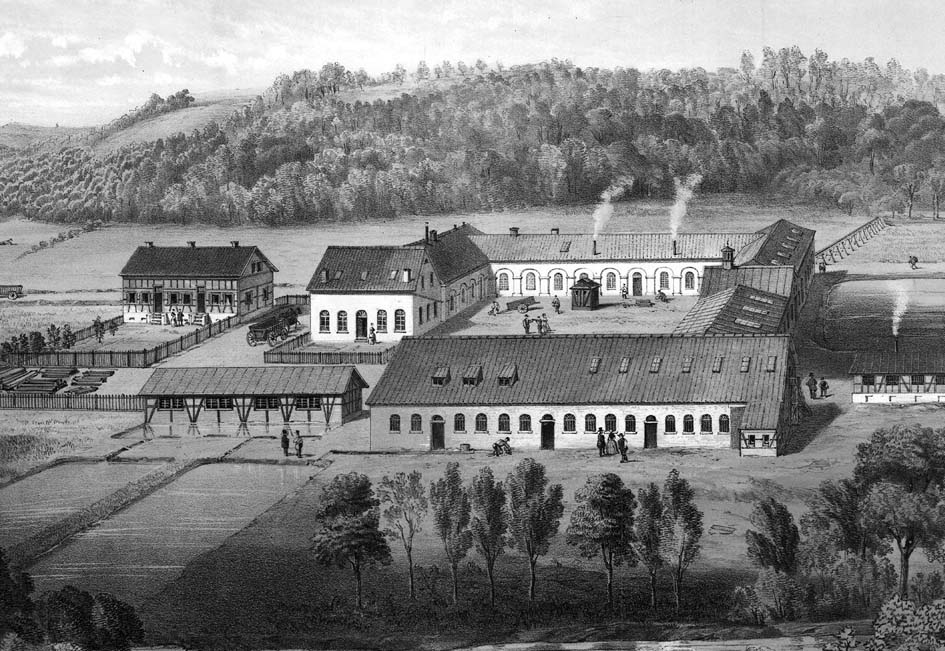 Lithographie von der Aufbereitungsanlage Immekeppel